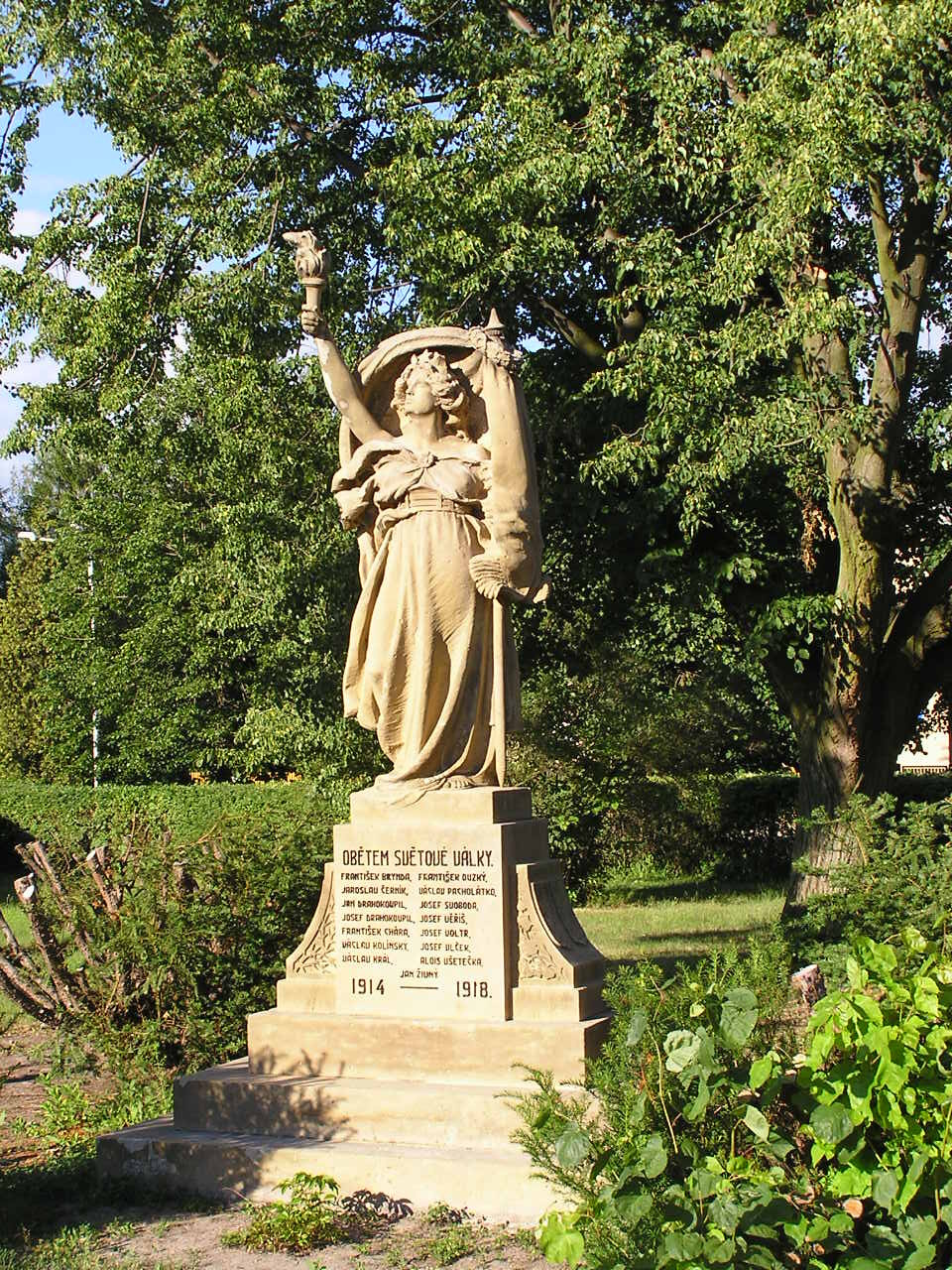 Klamoš (okres Hradec Králové) - Pomník I. světové války